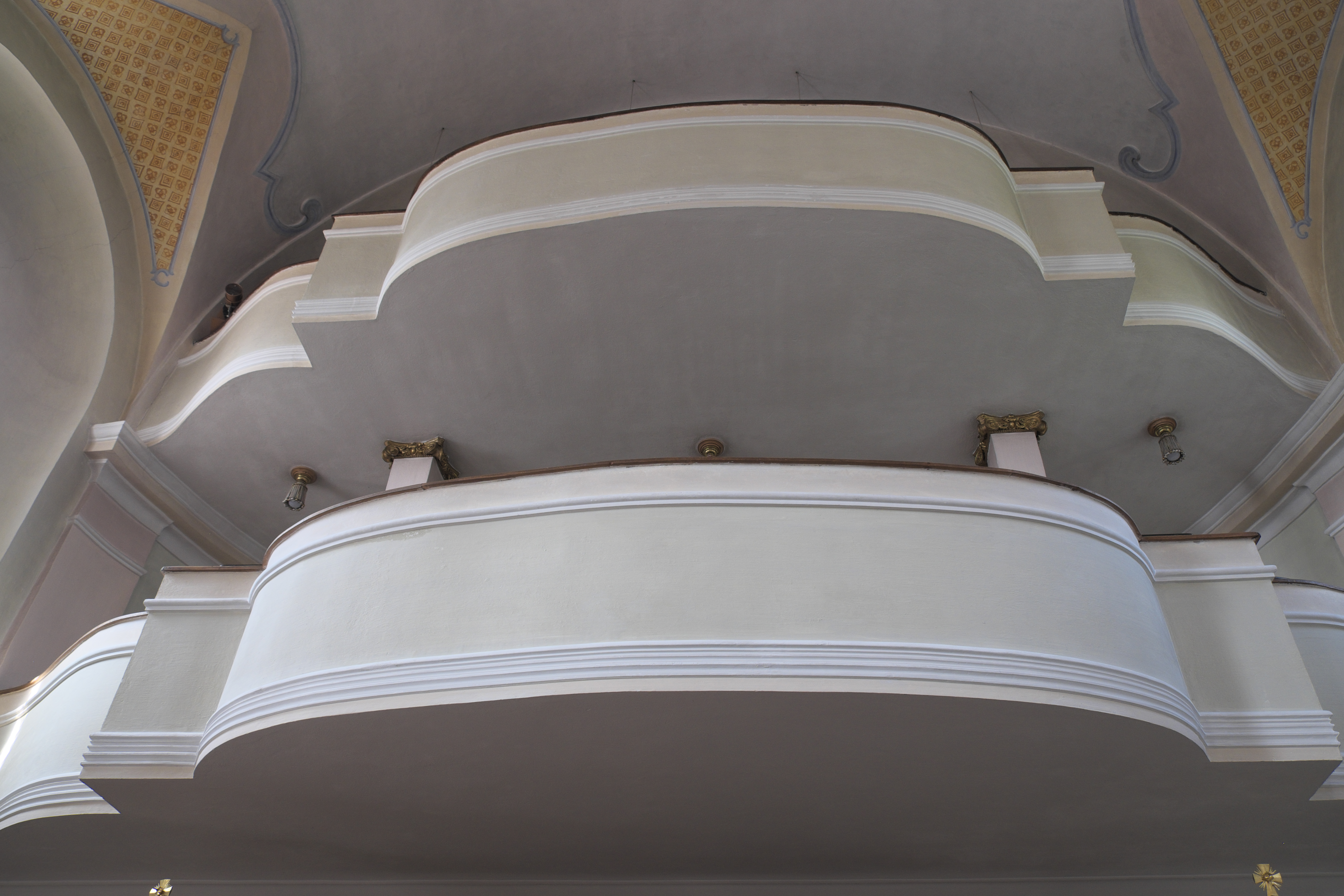 Katholische Pfarrkirche St. Florian in Fraunberg im Landkreis Erding (Bayern/Deutschland), Doppelempore